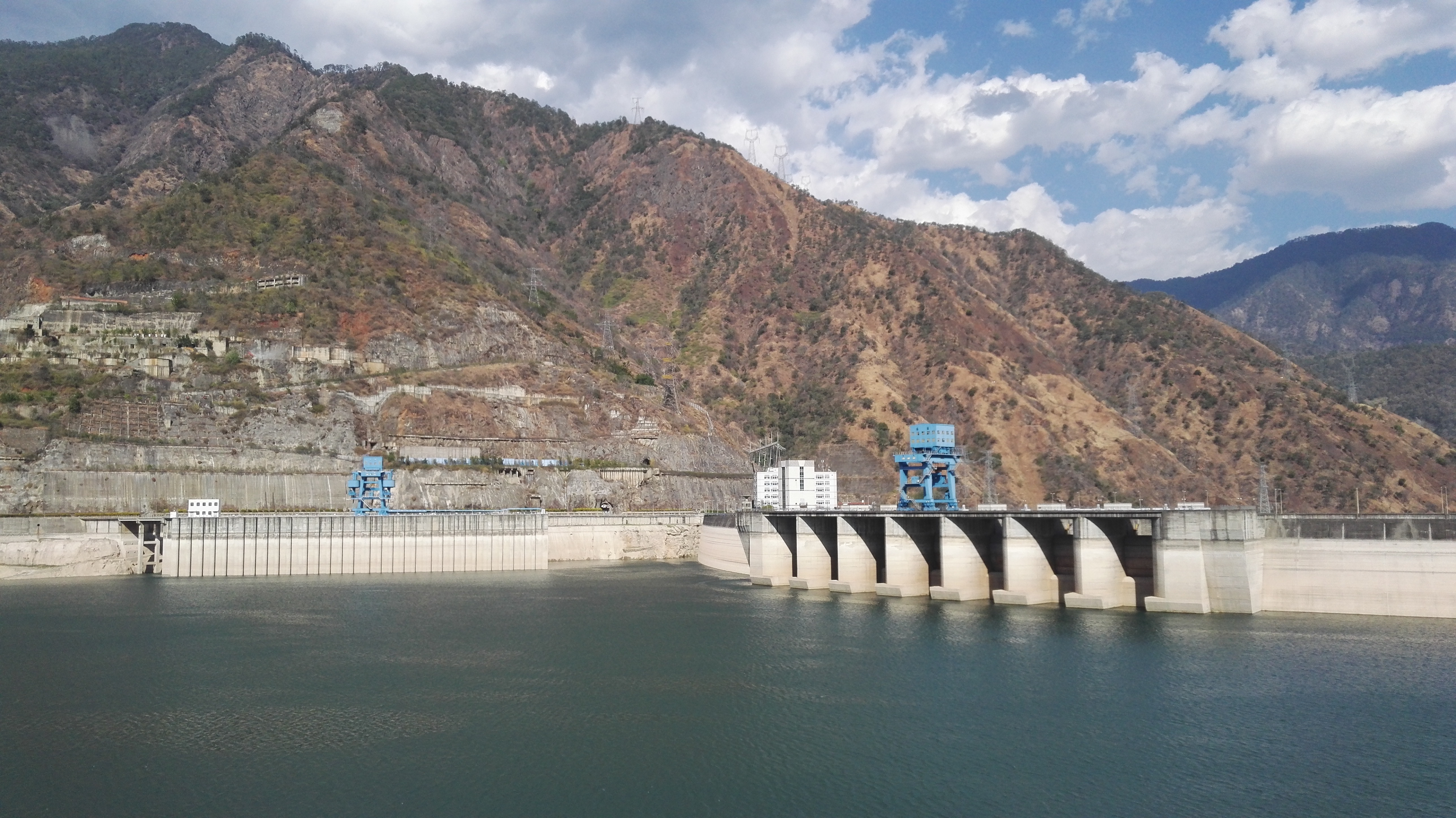 二滩大坝。照片左侧蓝色起重机下方是发电厂位于湖中的进水口，照片右侧蓝色起重机下方是位于坝体中部的7个溢流表孔，发电机组位于远处白色大楼后方地下的隧道内。